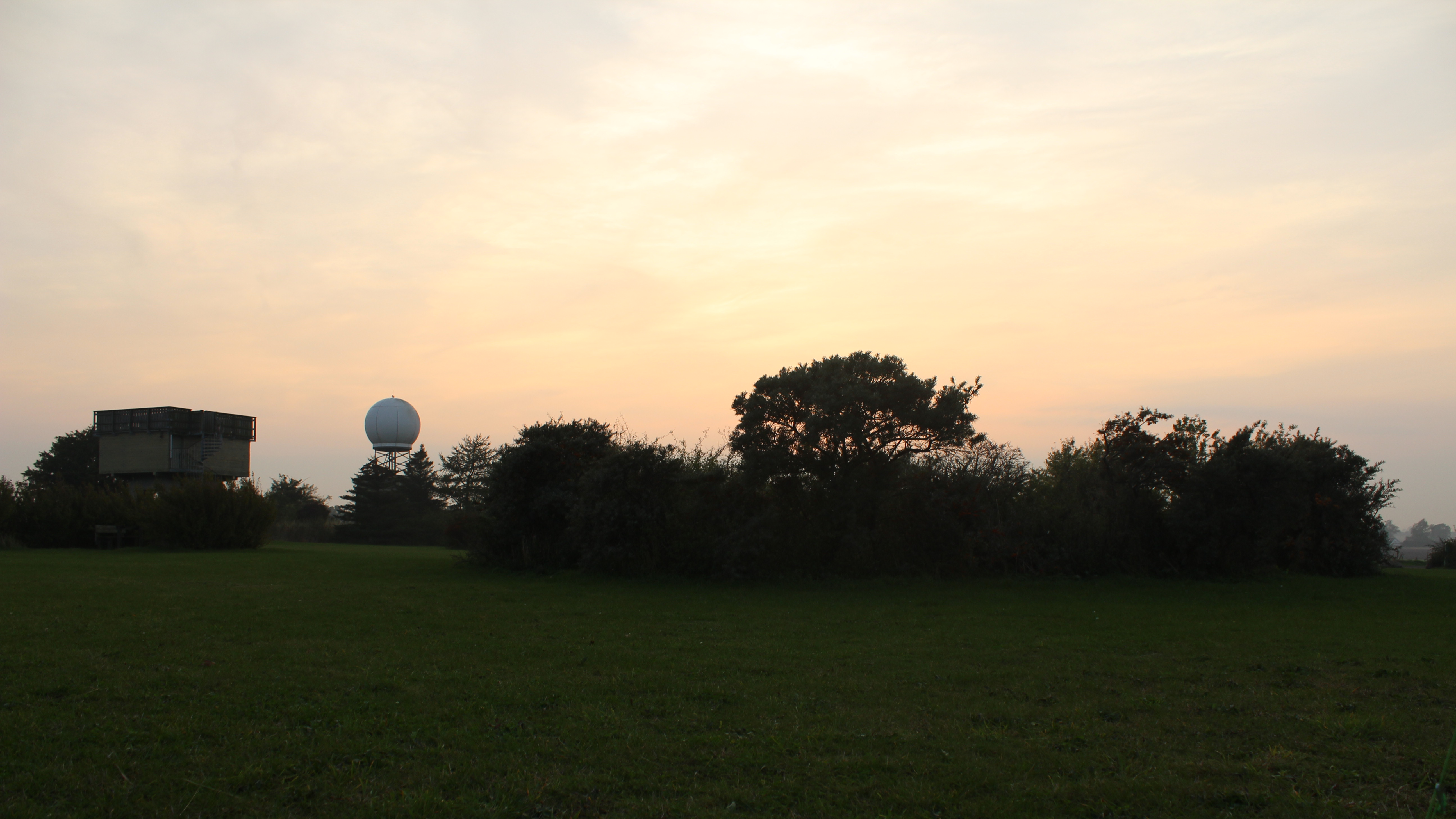 Udsigtstårn og vejrradar ved Rasteplads Flagbanken